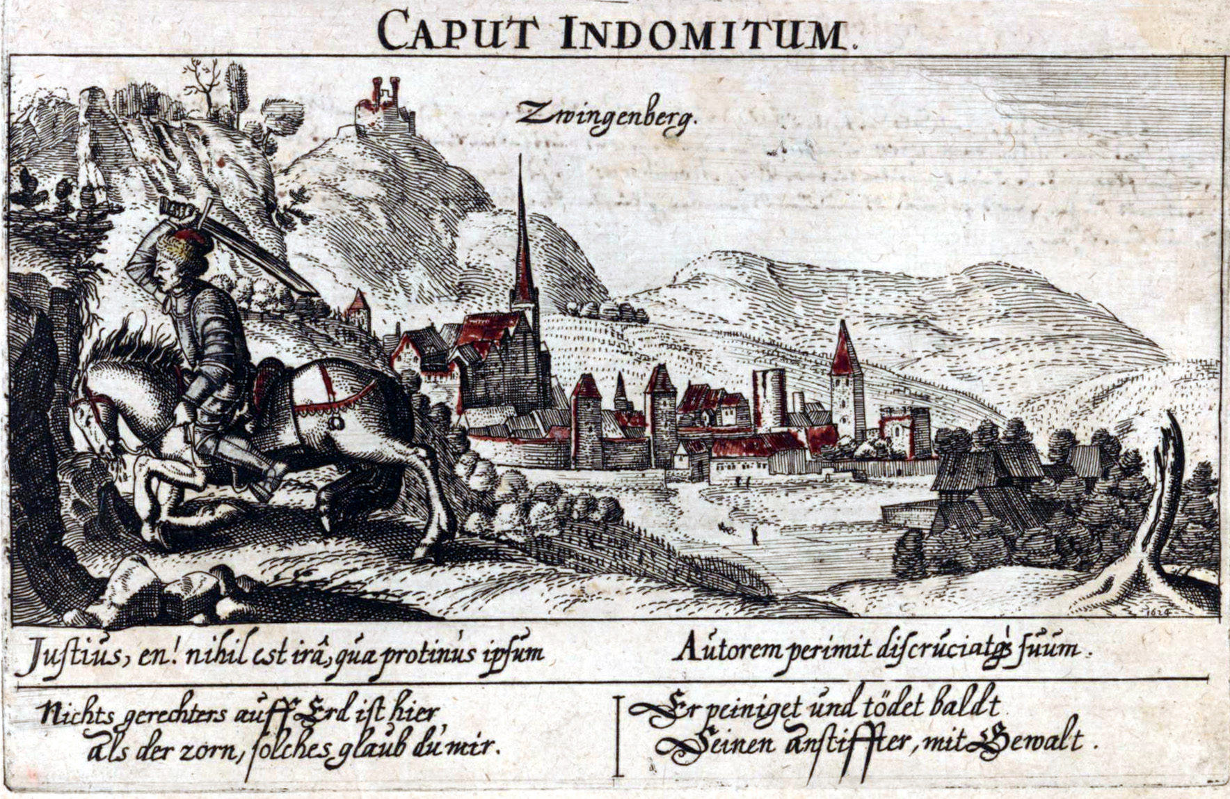 Zwingenberg an der Bergstraße nach eine Werk von Daniel Meisner